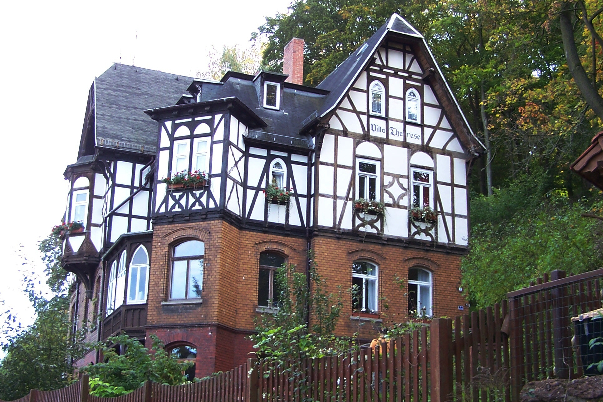 Die jetzt als KITA genutzte Villa Therese am Eichrodter Weg 1 in Eisenach bildet auch den nördlichen Zugang zum Stadtpark.